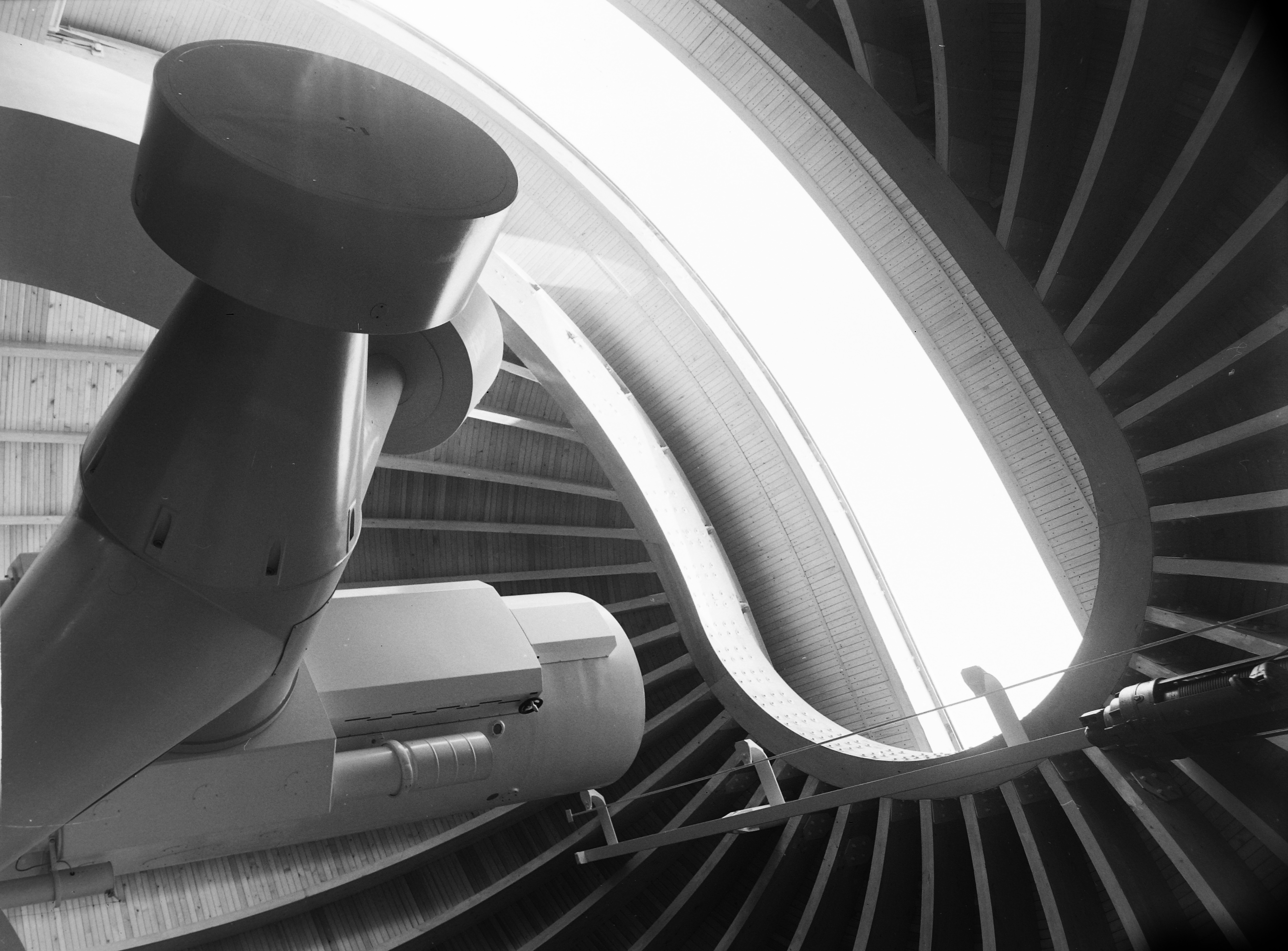 a Piszkéstetői Obszervatórium 1 m-es RCC távcsöve. Location: Hungary Tags: observatory, telescope Title: a Piszkéstetői Obszervatórium 1 m-es RCC távcsöve.